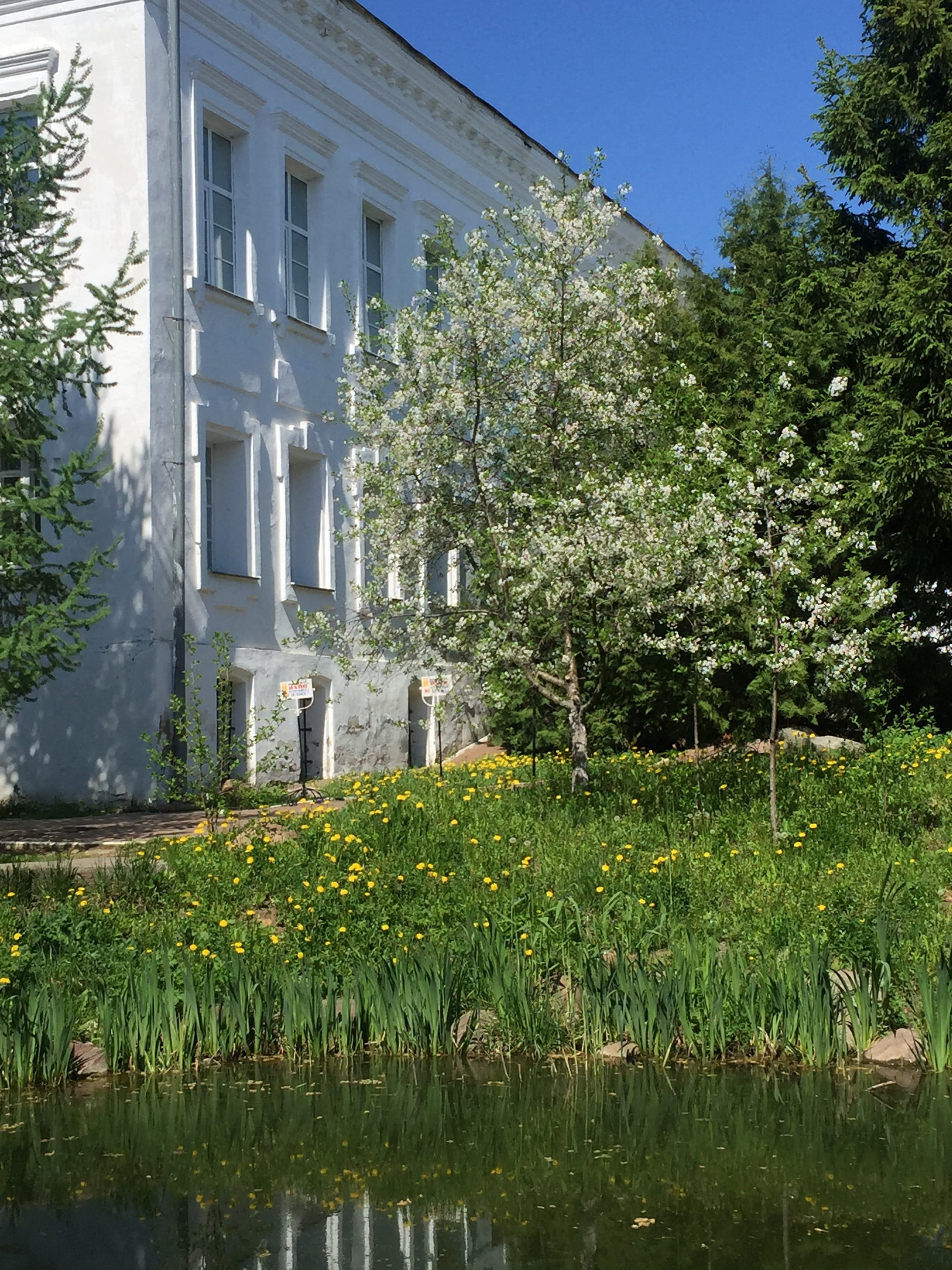 Сад в монастыре в Ростове Великом